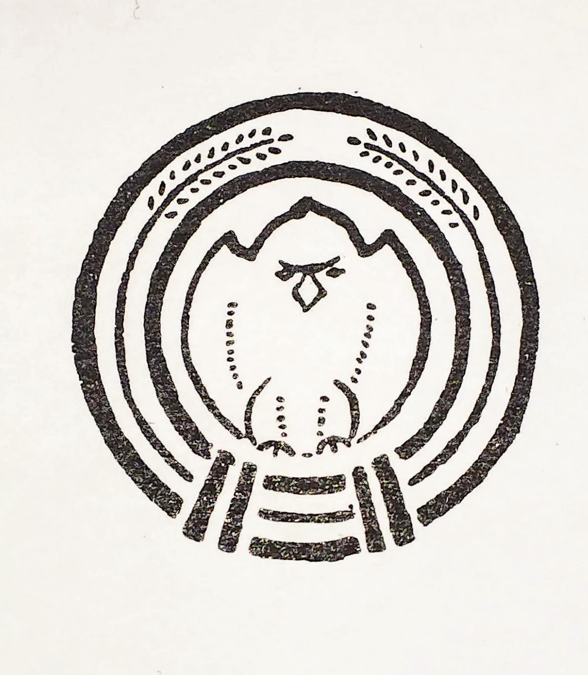 飛田遊廓（新地）紋章